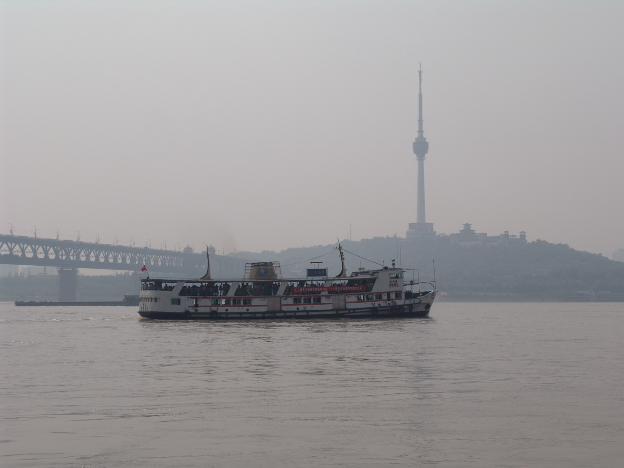 武汉轮渡 Bân-lâm-gú: Bú-hàn ê tōo-tsûn. 武漢的渡船。